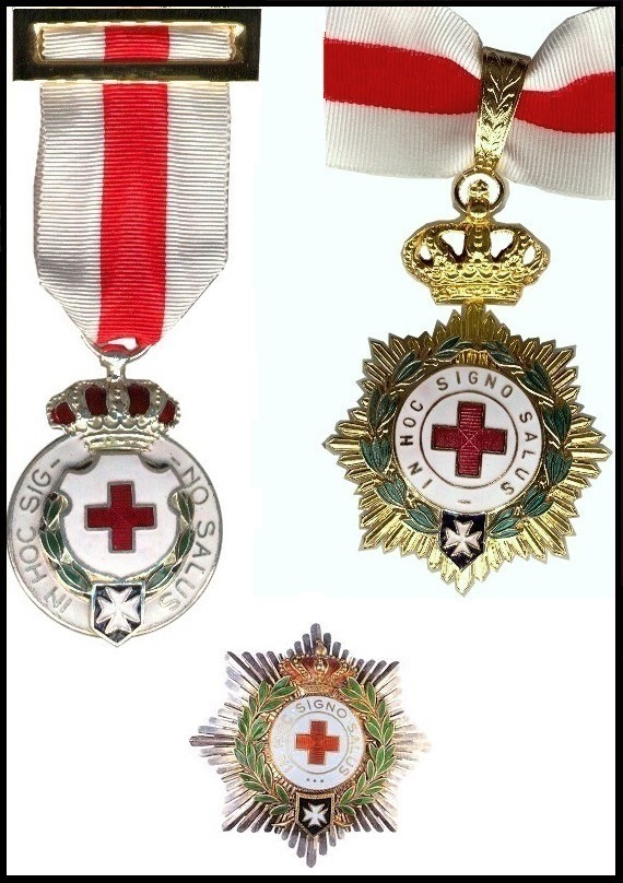 Condecoraciones de la Cruz Roja en España